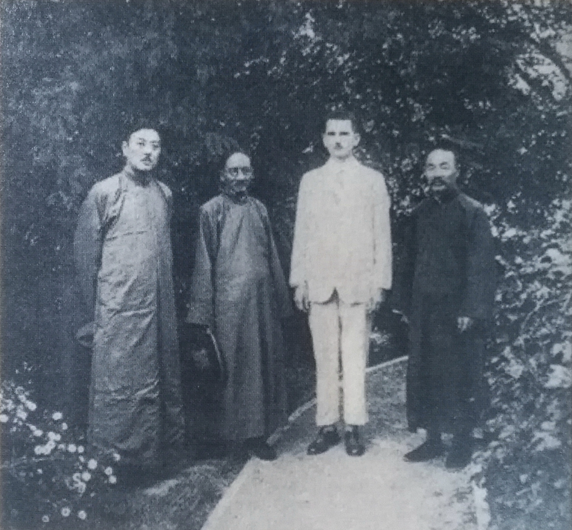 1930年9月，蔡元培（左二）在青岛筹办国立青岛大学期间，与青岛礼贤中学校长刘铨法（左一）、校督苏保志（Wilhelm Seufert，左三）、谭玉峰参观礼贤中学